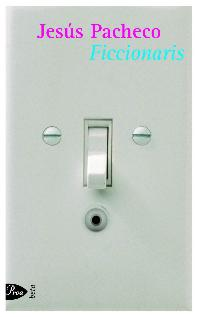 Llibre "Ficcionaris" de Jesús Pacheco